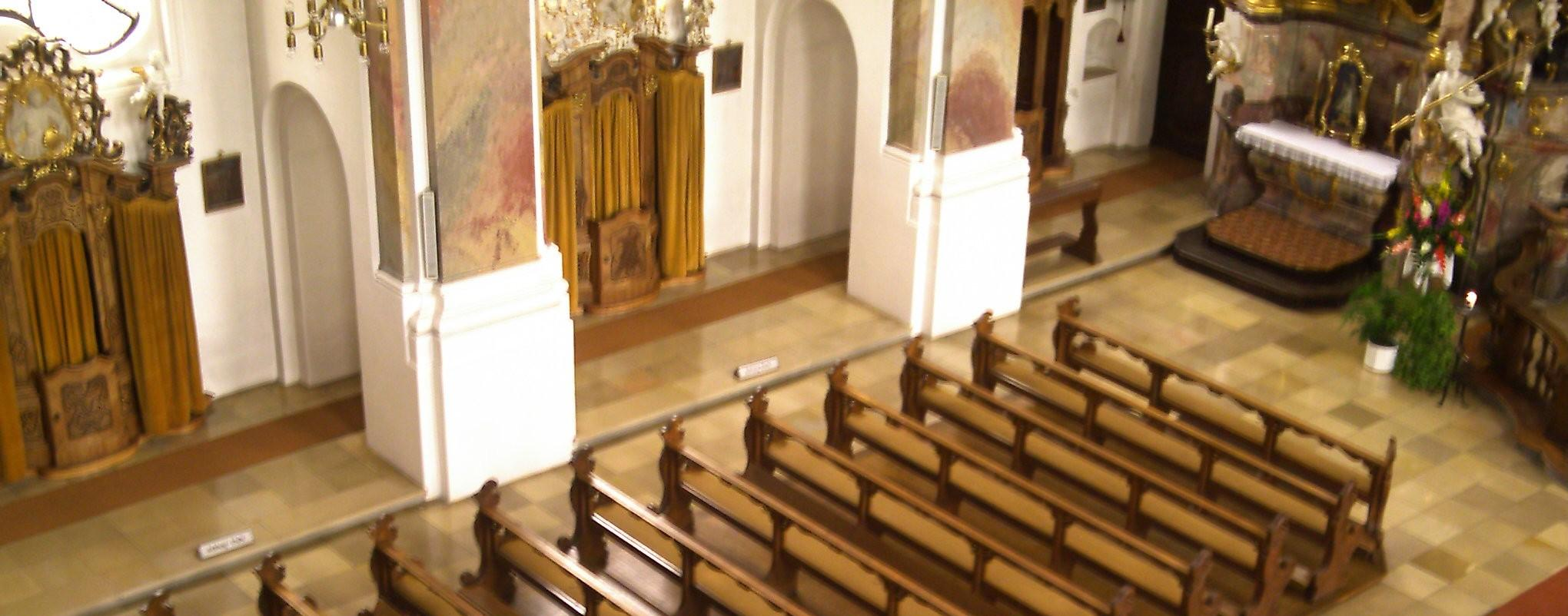 Maria Steinbach, Beichtstühle